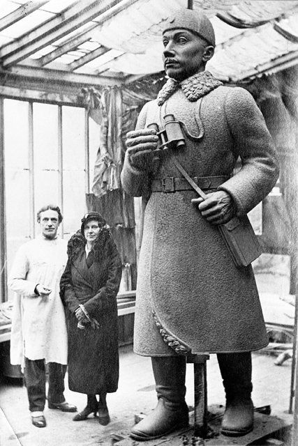 Kapten Anton Irve mälestussammas ateljees